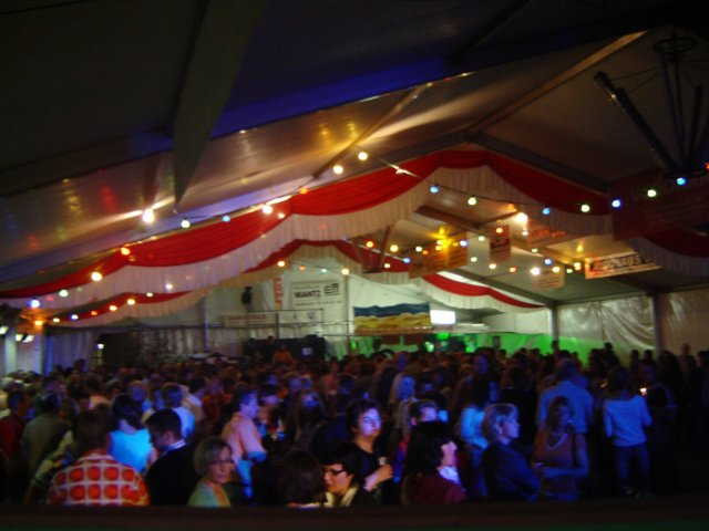 Das Bild zeigt eine Zeltkirmes, wie sie in vielen kleineren Dörfern in Deutschland veranstaltet wird.